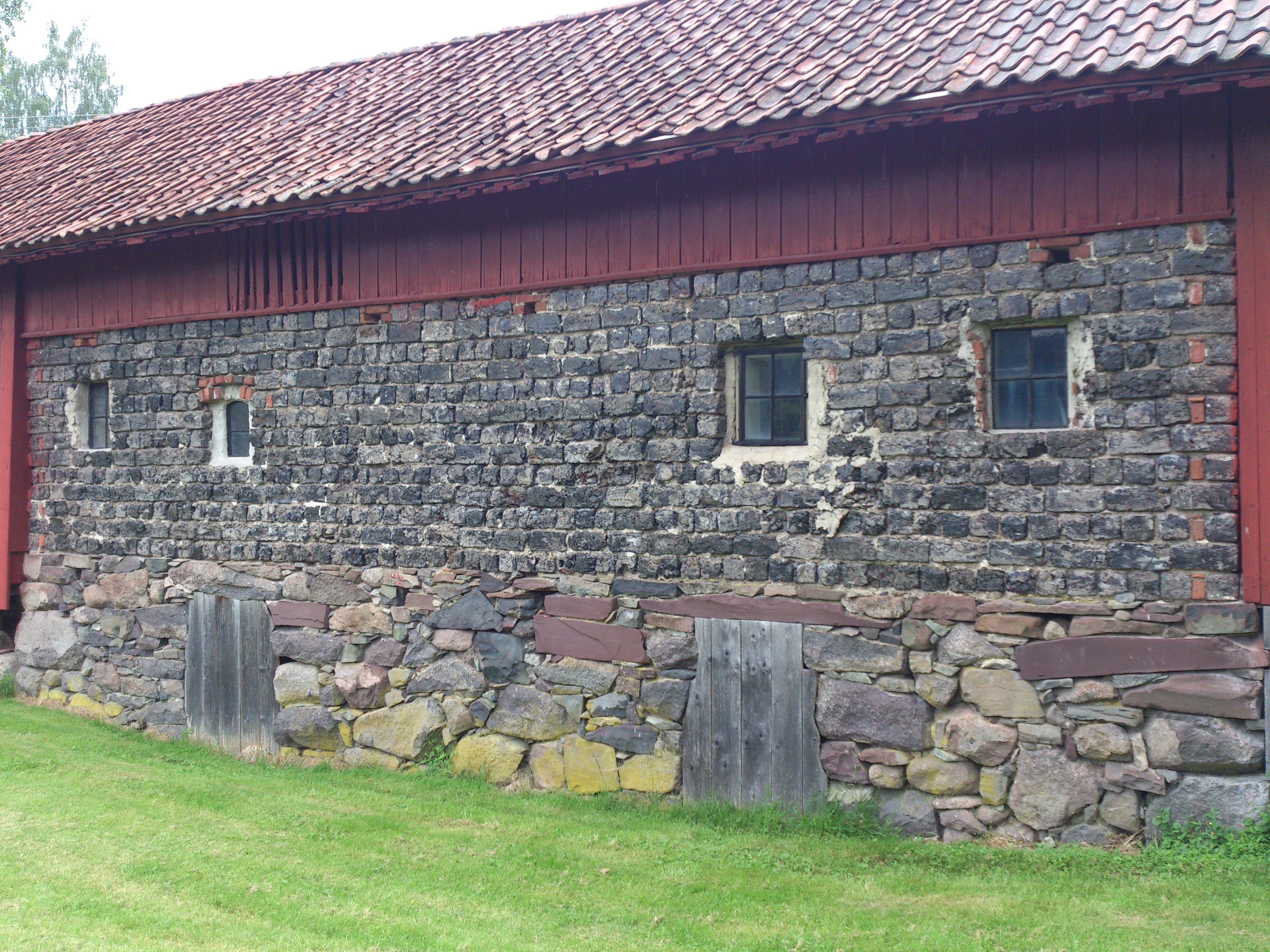 Slaggsteinsmur